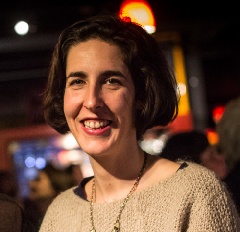 Antoine Boutet, lauréat "Films en Cours", et Lili Hinstin, directrice artistique du Festival EntreVues en 2013.